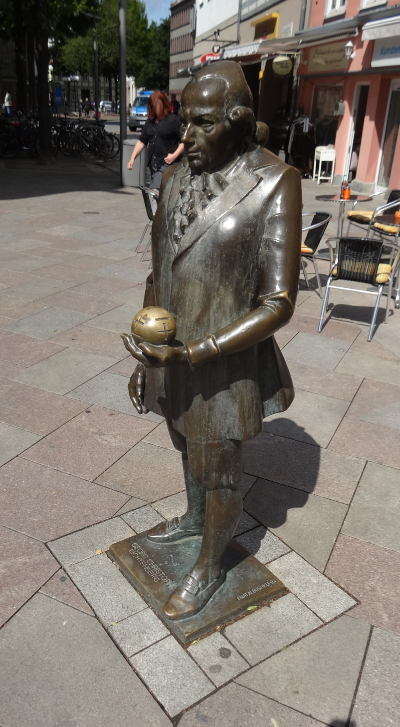 Göttingen, Lichtenberg-Statue, Markt, neuer Standort seit 2015